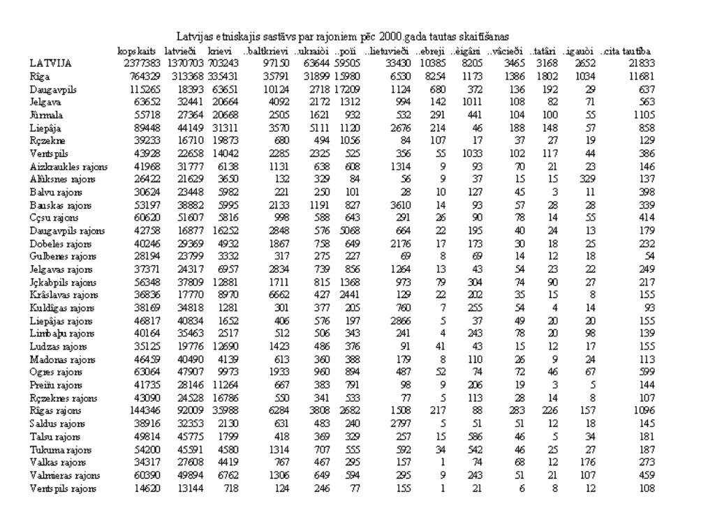 Latvijas 2000.gada tautas skaitīšanas rezultati